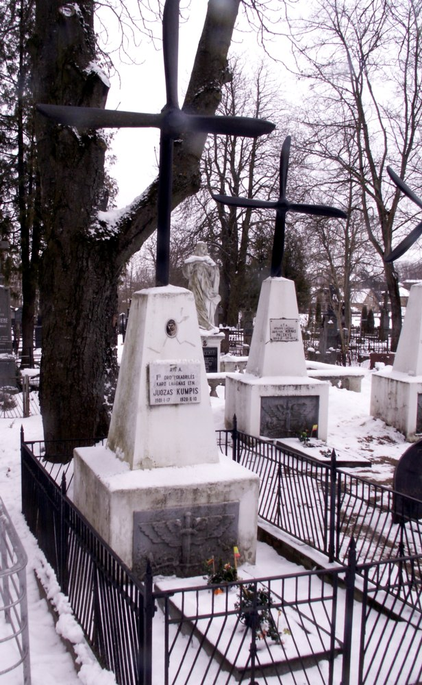 Juozo Kumpio kapas